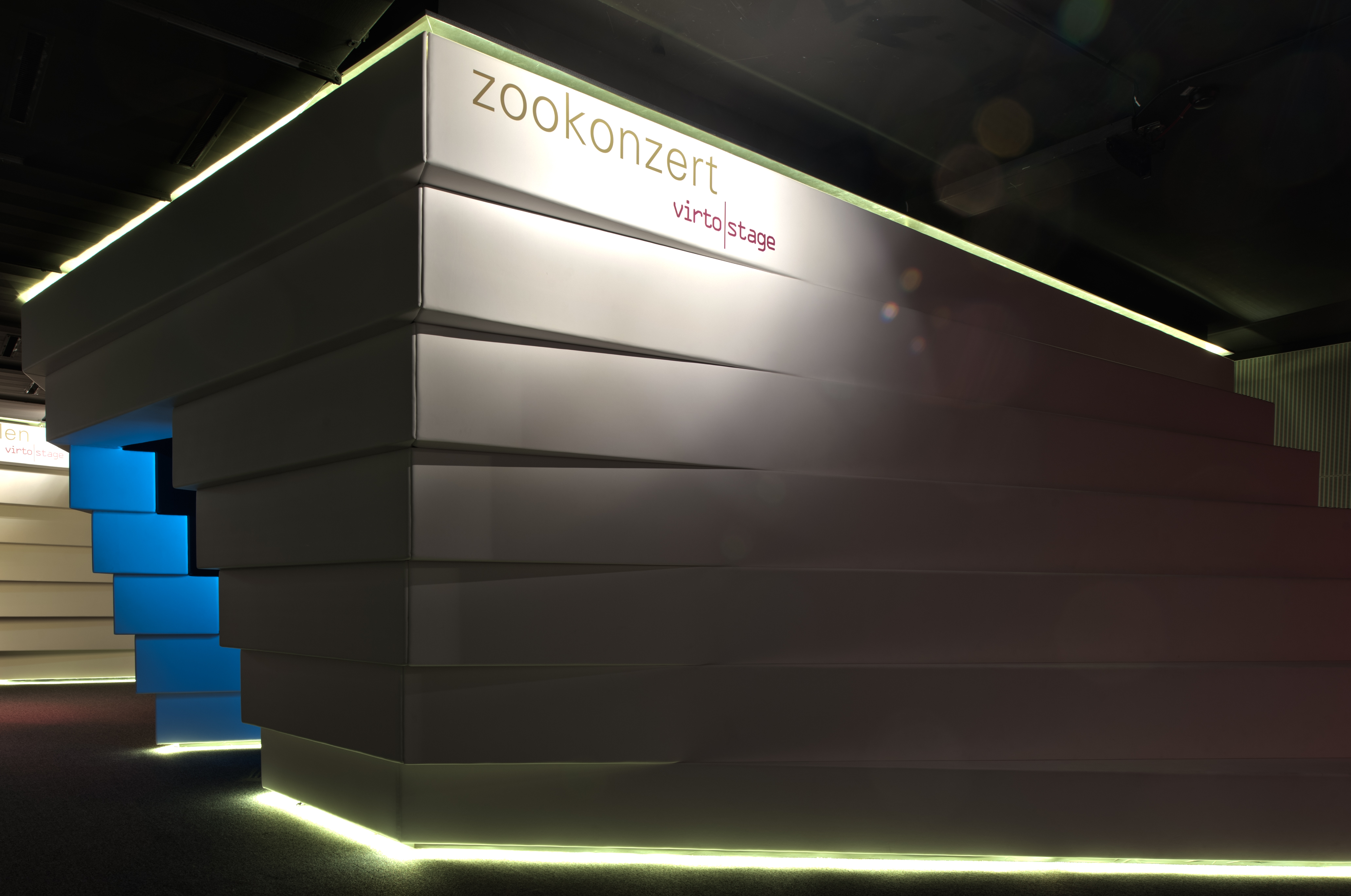 Die virtostage mit den beiden Inhalten "zeitperlen" und "zookonzert".